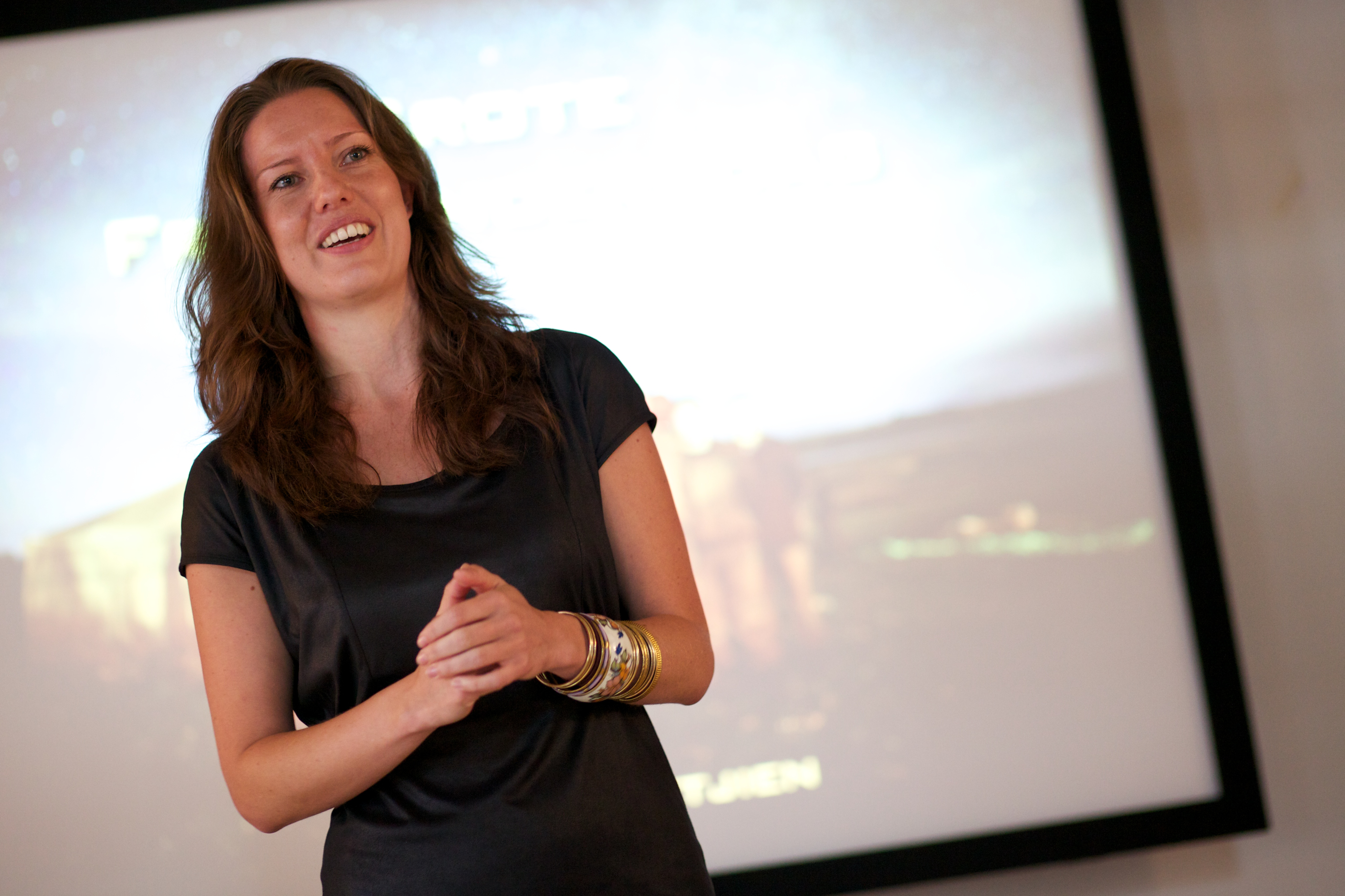 NVJ Freelancersdag, 5 juni 2012